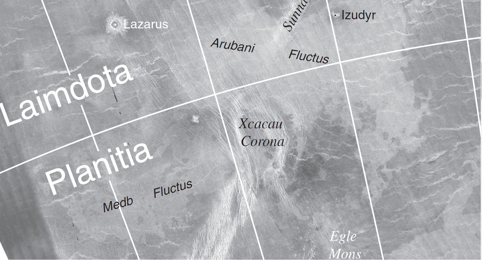 Xcacau Corona, sur la planète Vénus. Image radar captée par la sonde Magellan.